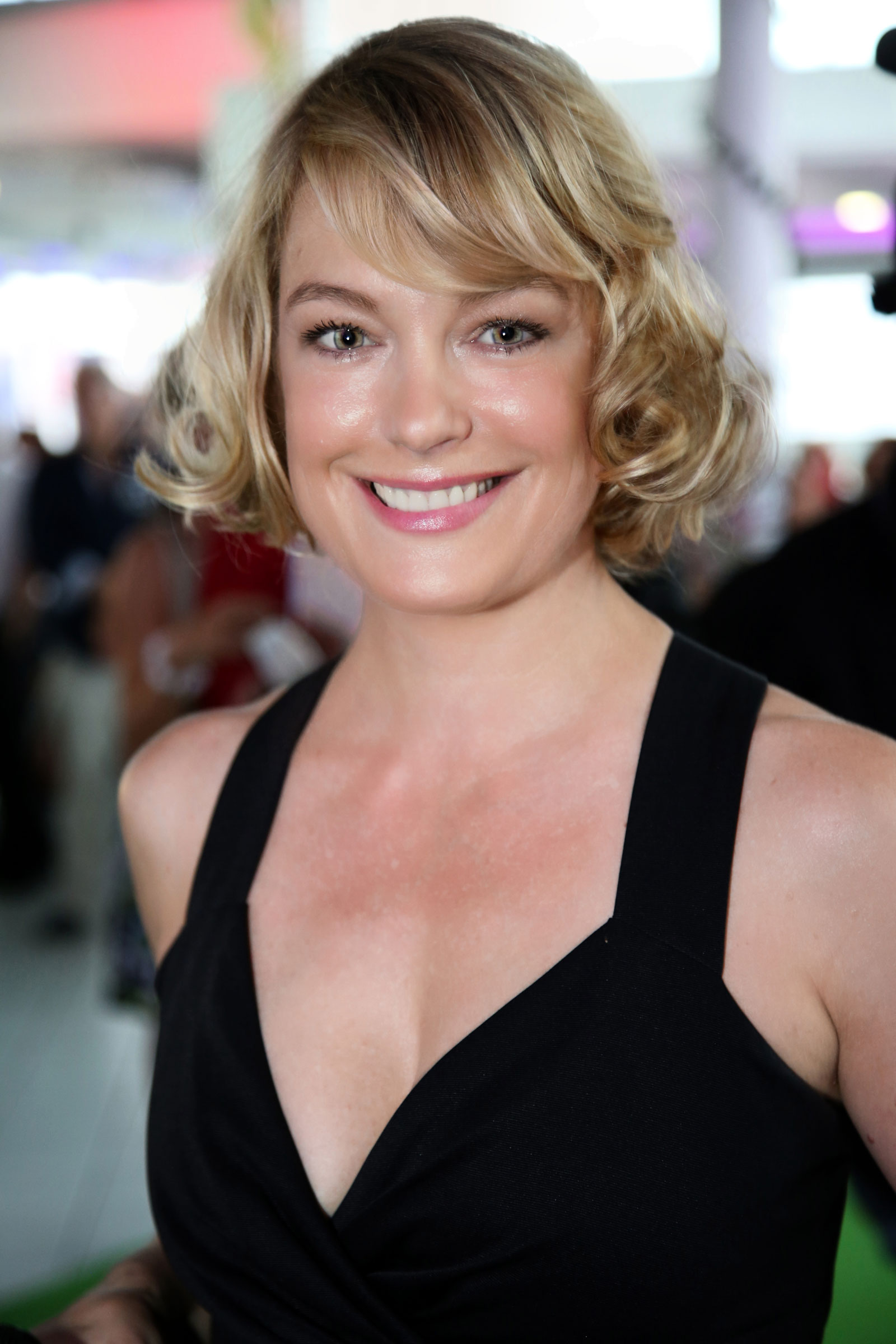 Winkens_Elke-7342-fmp